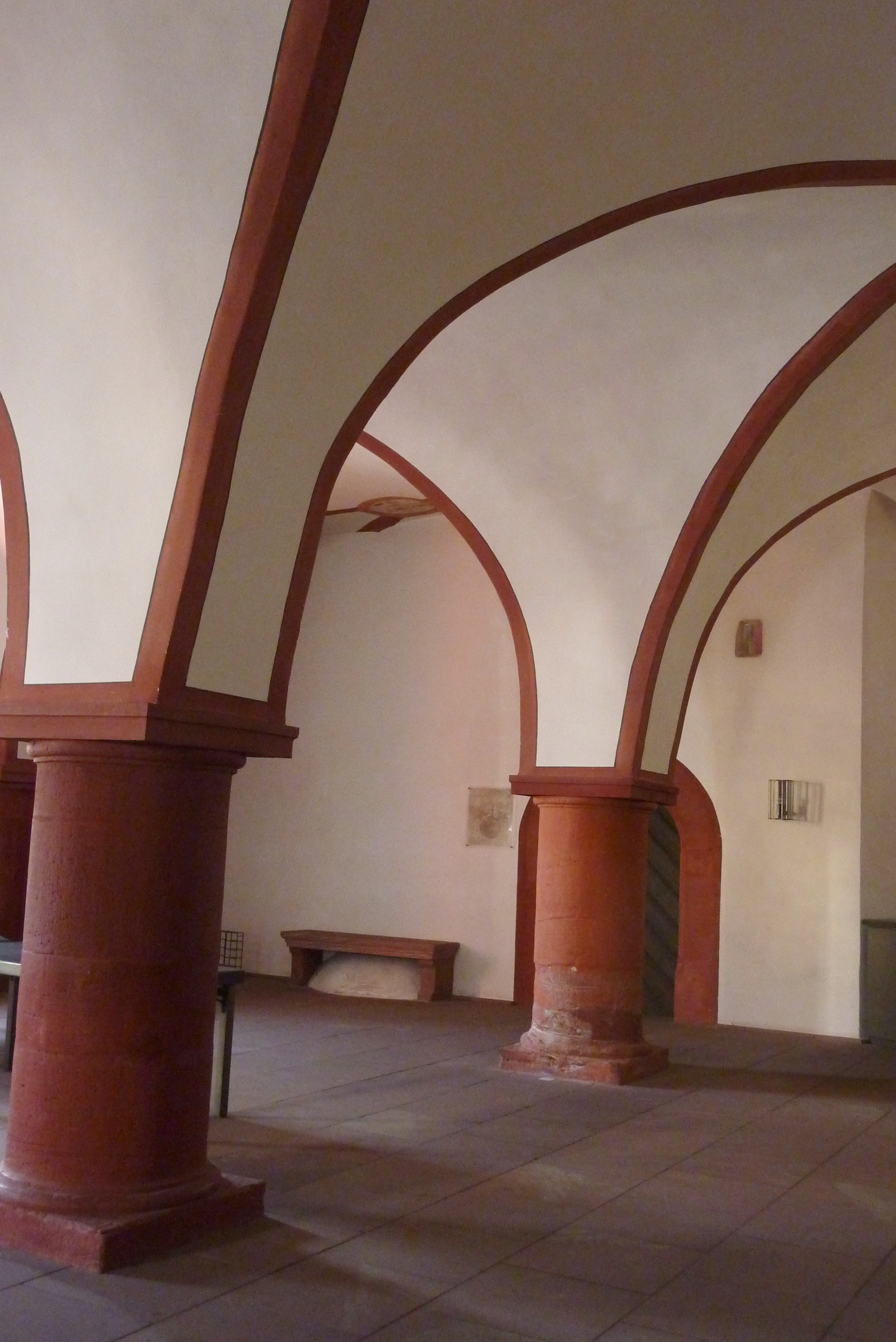 Rathaus in Bürgstadt im Landkreis Miltenberg (Bayern, Deutschland), Gewölbehalle